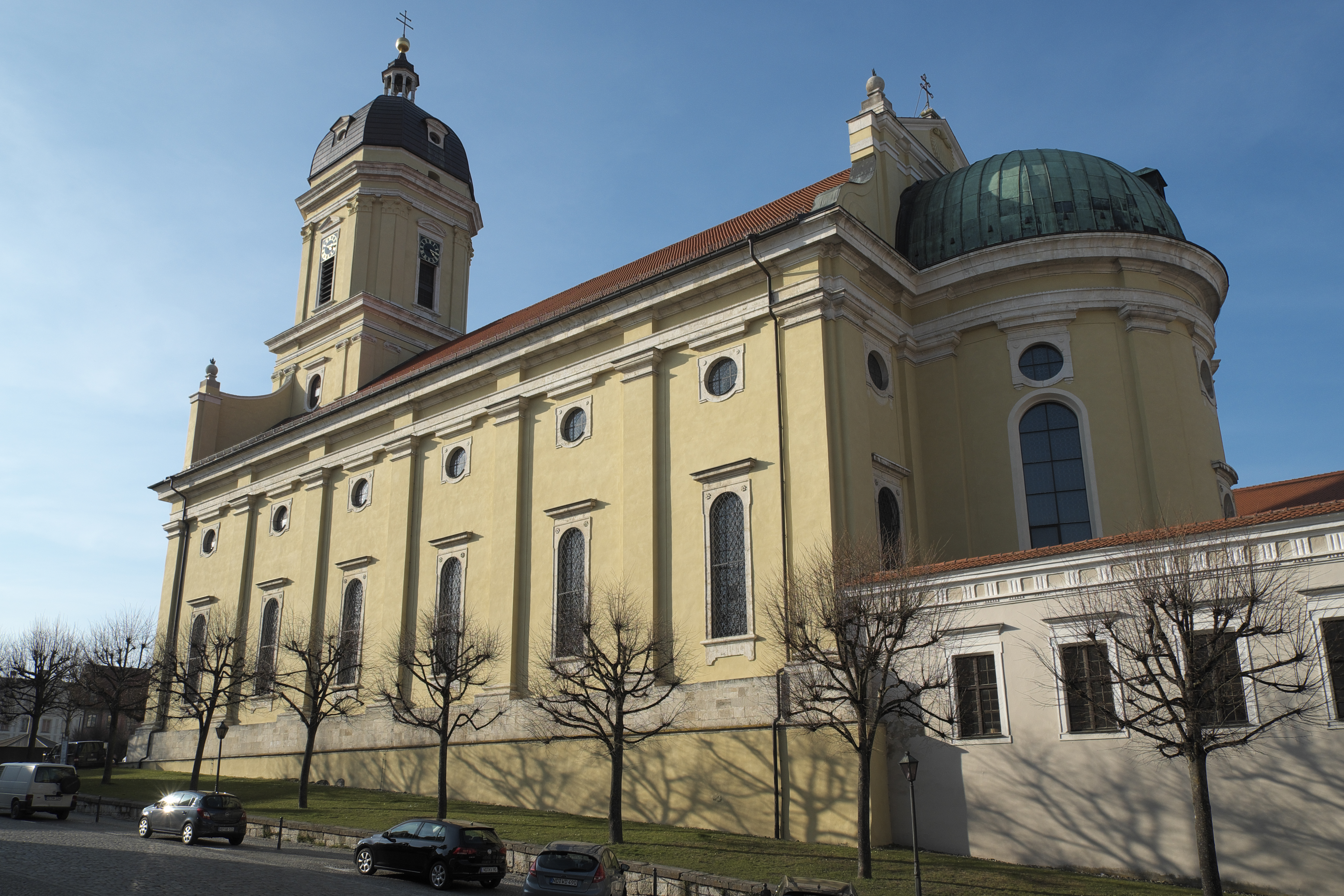 Katholische Hofkirche Mariä Himmelfahrt in Neuburg an der Donau im Landkreis Neuburg-Schrobenhausen (Oberbayern/Bayern)